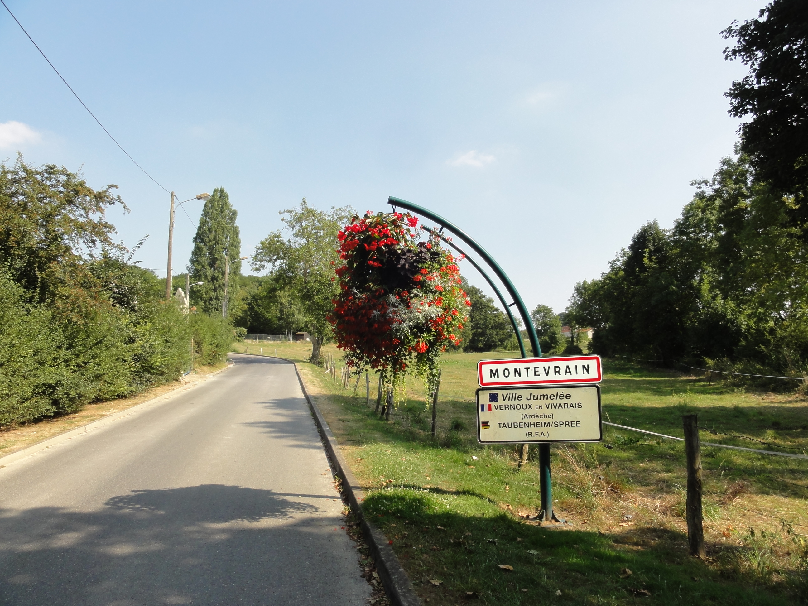 entrée de la ville